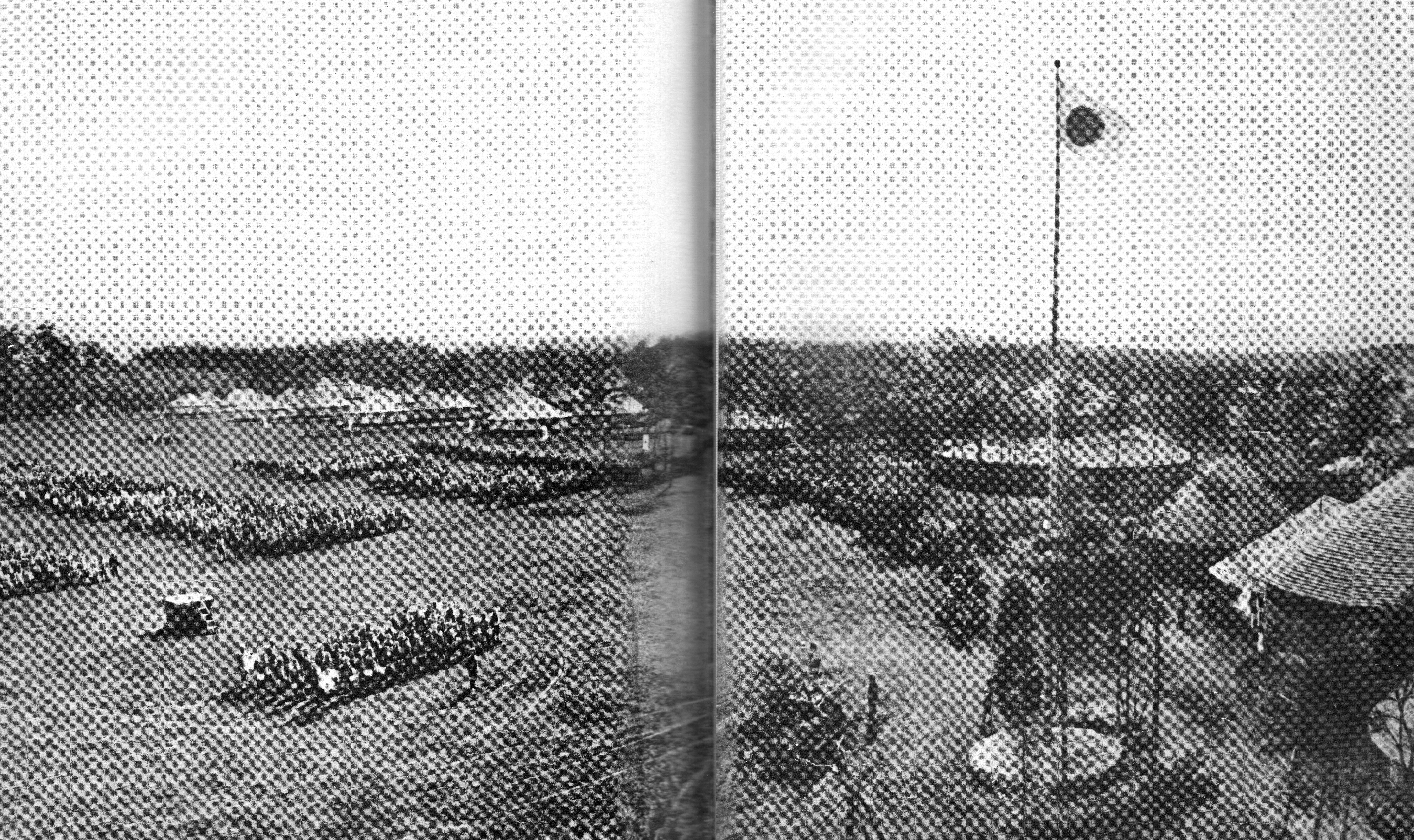 満蒙開拓青少年義勇軍の内原訓練所。